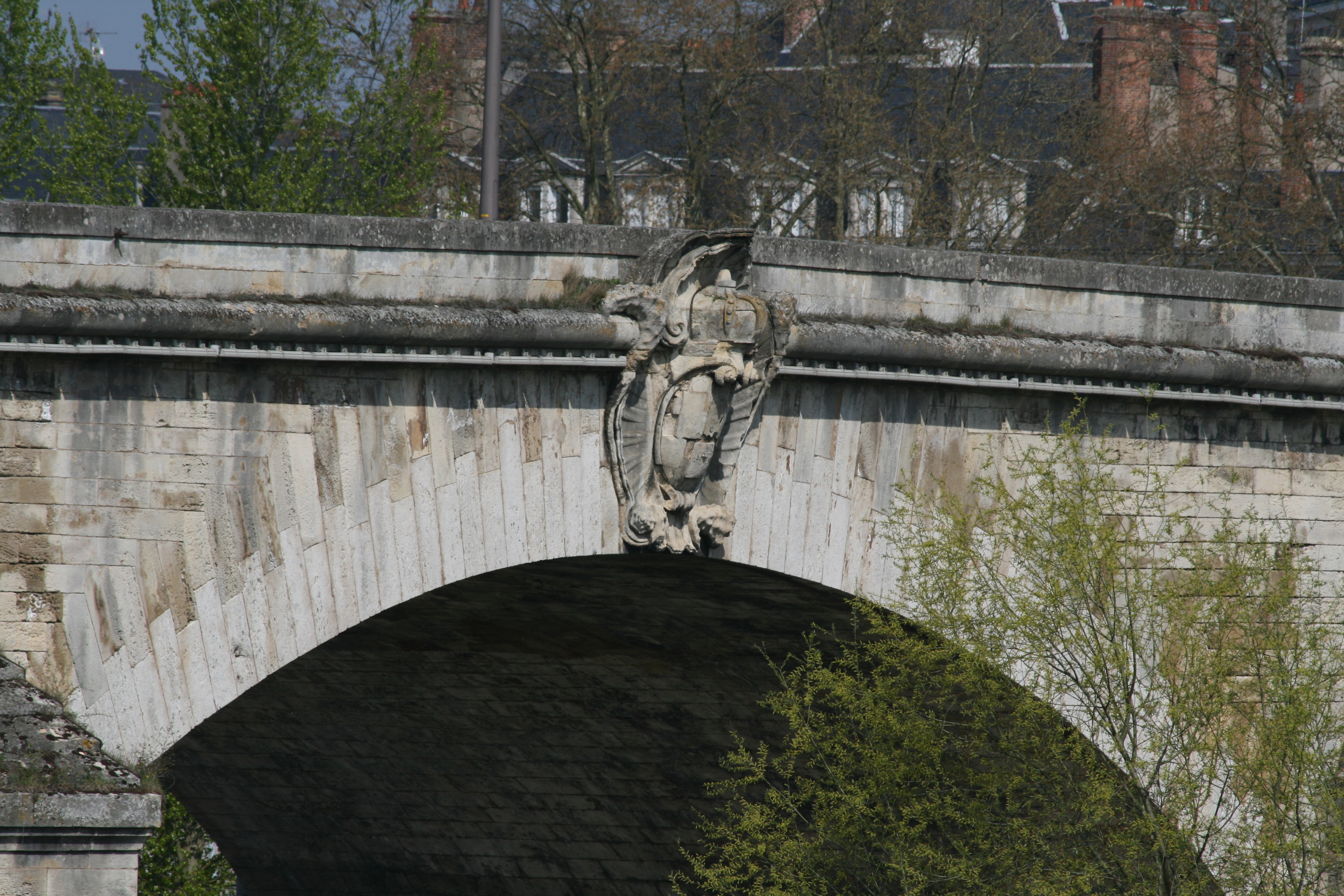 Cartouche royal, sculpté par Christophe-Gabriel Allegrain, Pont George V, Orléans, Loiret, France